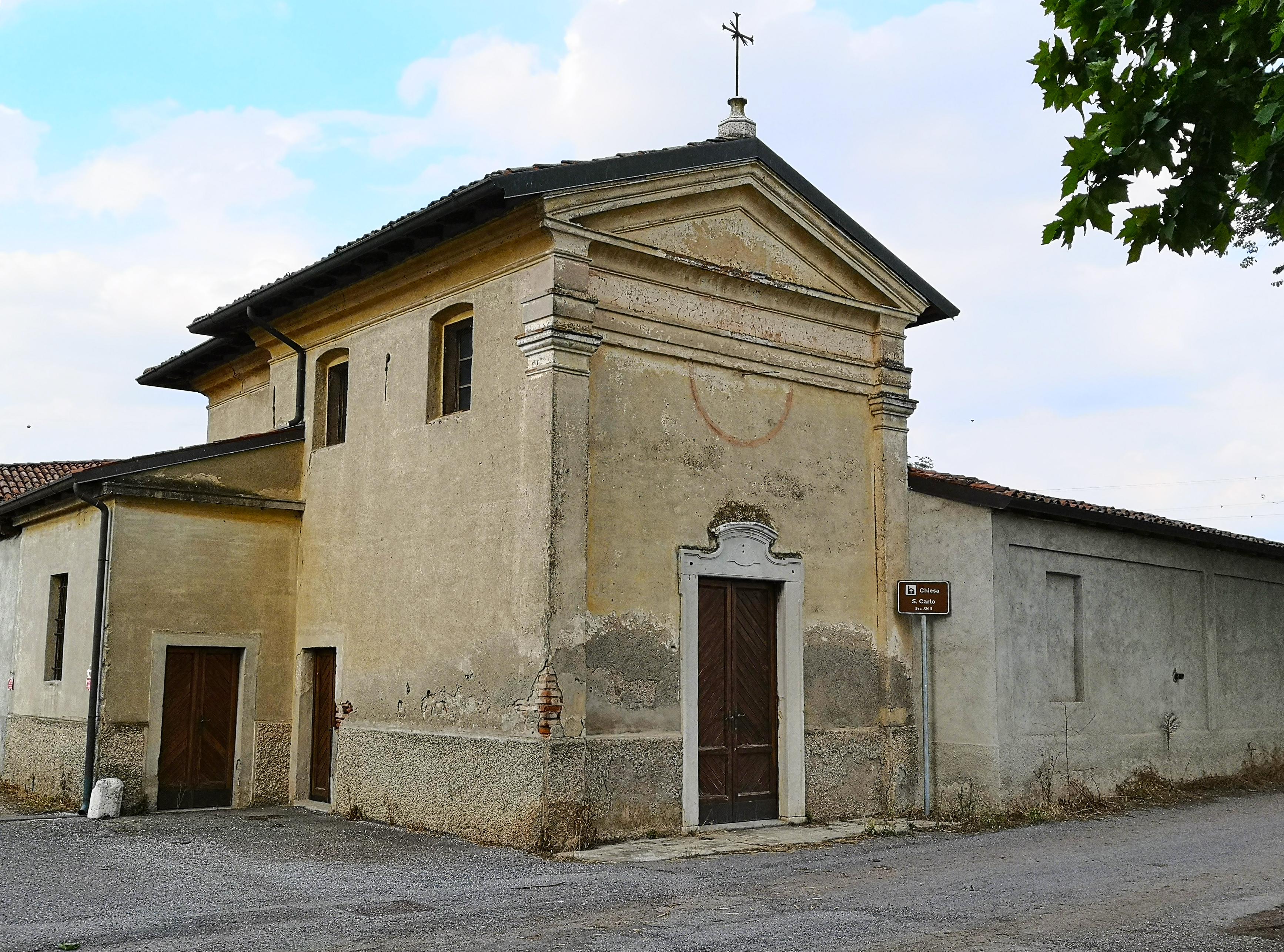 Chiesa di San Carlo presso la cascina Finiletti (periferia di Travagliato)